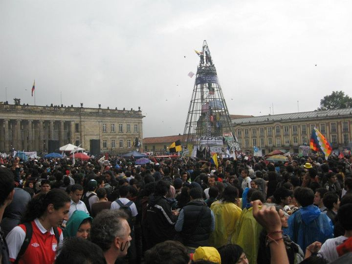 Plaza de Bolivar de Bogotá en la Toma a Bogotá por la educación el 10 de noviembre de 2011